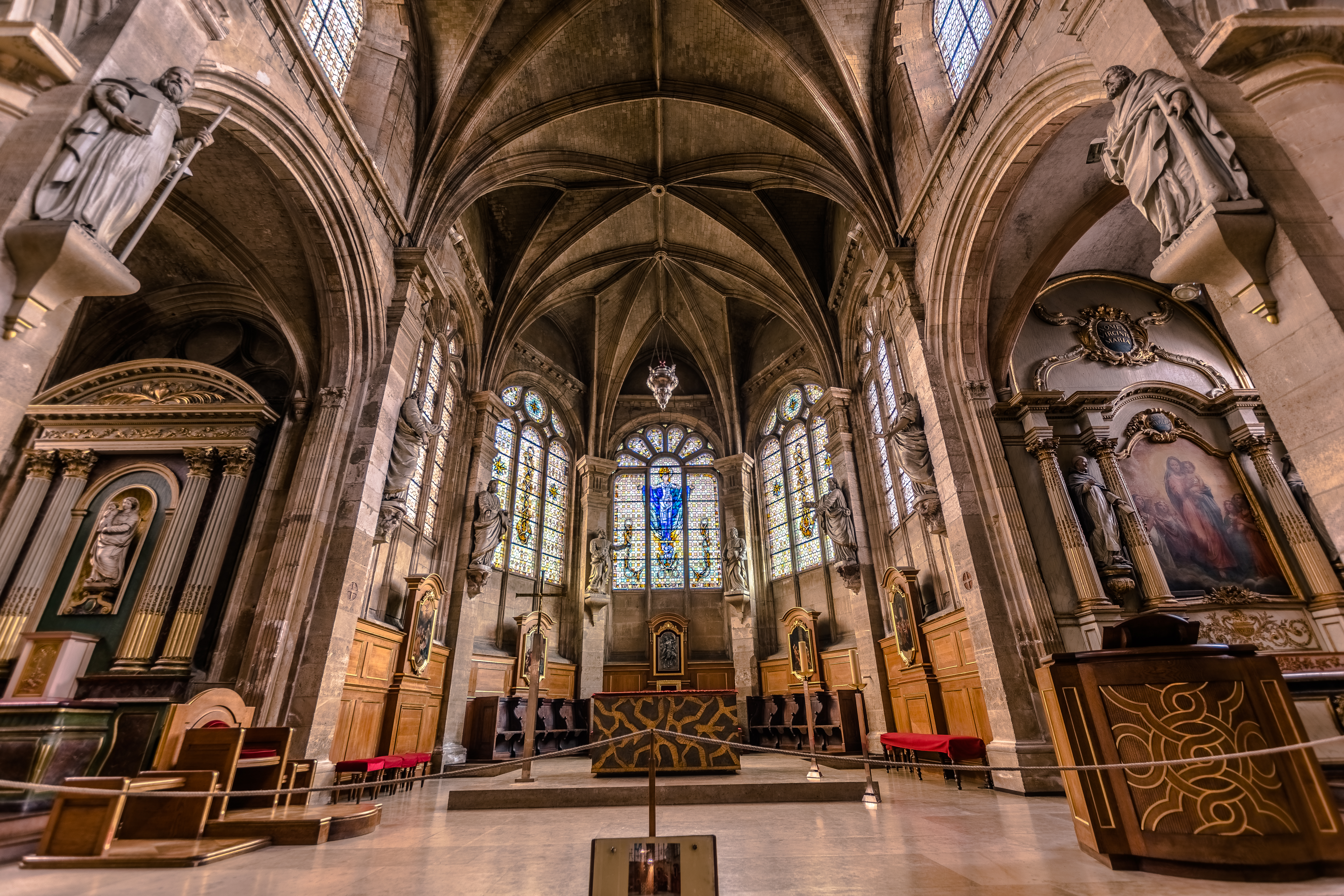 Le chœur de la cathédrale Notre-Dame, placé dans l'abside qui fut par le passé la chapelle axiale. L'autel et l'ambon sont modernes et ont été installés en 1974 lors de la dédicace de la cathédrale. On y trouve des stalles du XIXe siècle, une cathèdre de style Napoléon, et des peintures sur bois du début du XVIIe siècle représentant la vie de Jésus. La première travée du chœur est flanquée de deux chapelles dans deux absidioles carrées qui forment les terminaisons des deux nefs latérales. Les deux autels secondaires sont liés au culte marial.